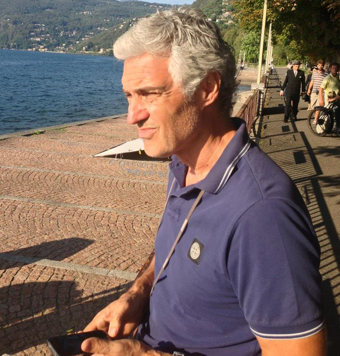 Fabio Zamarion, direttore della fotografia italiano.